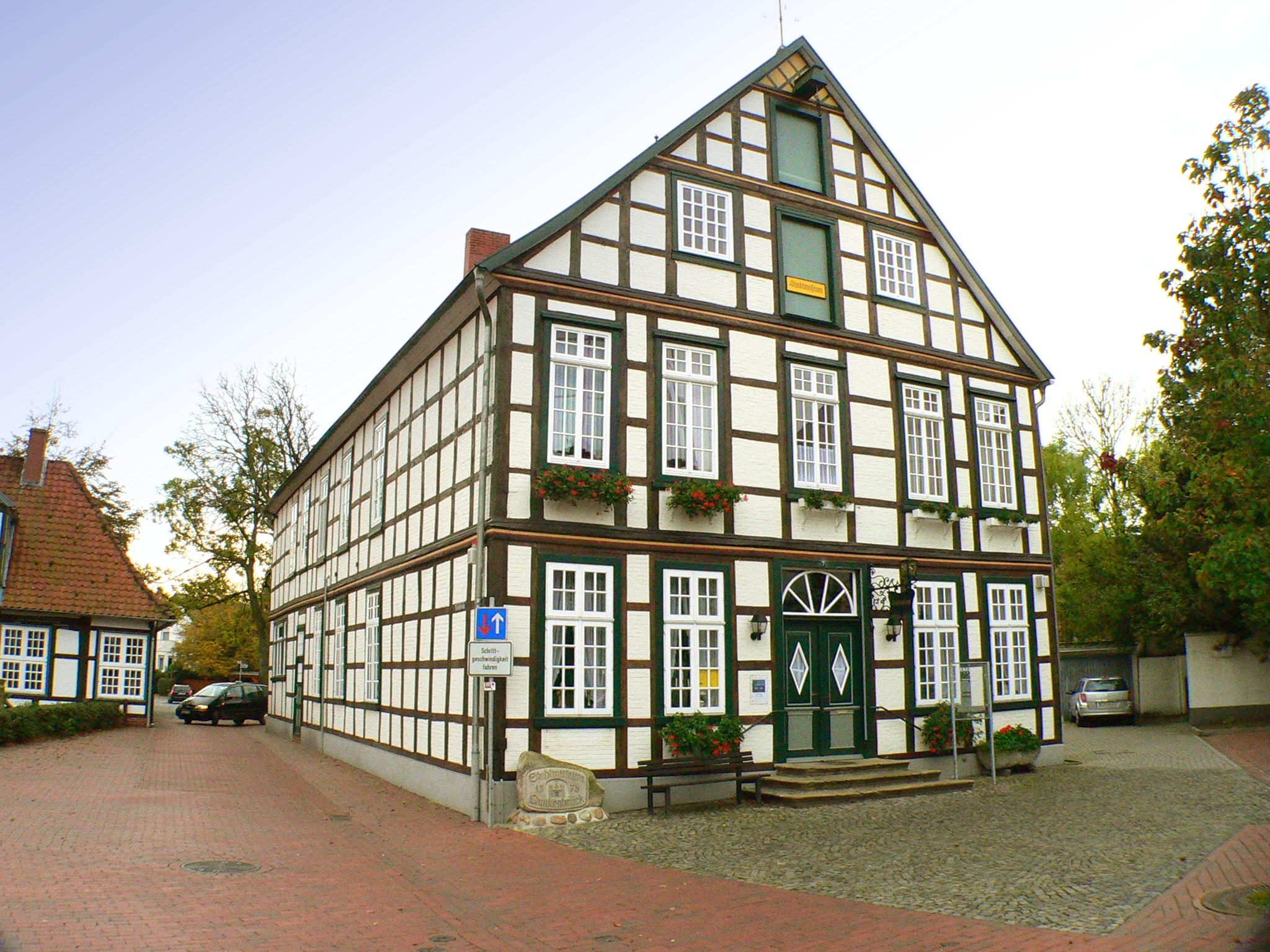 Stadtmuseum in Quakenbrück, Deutschland